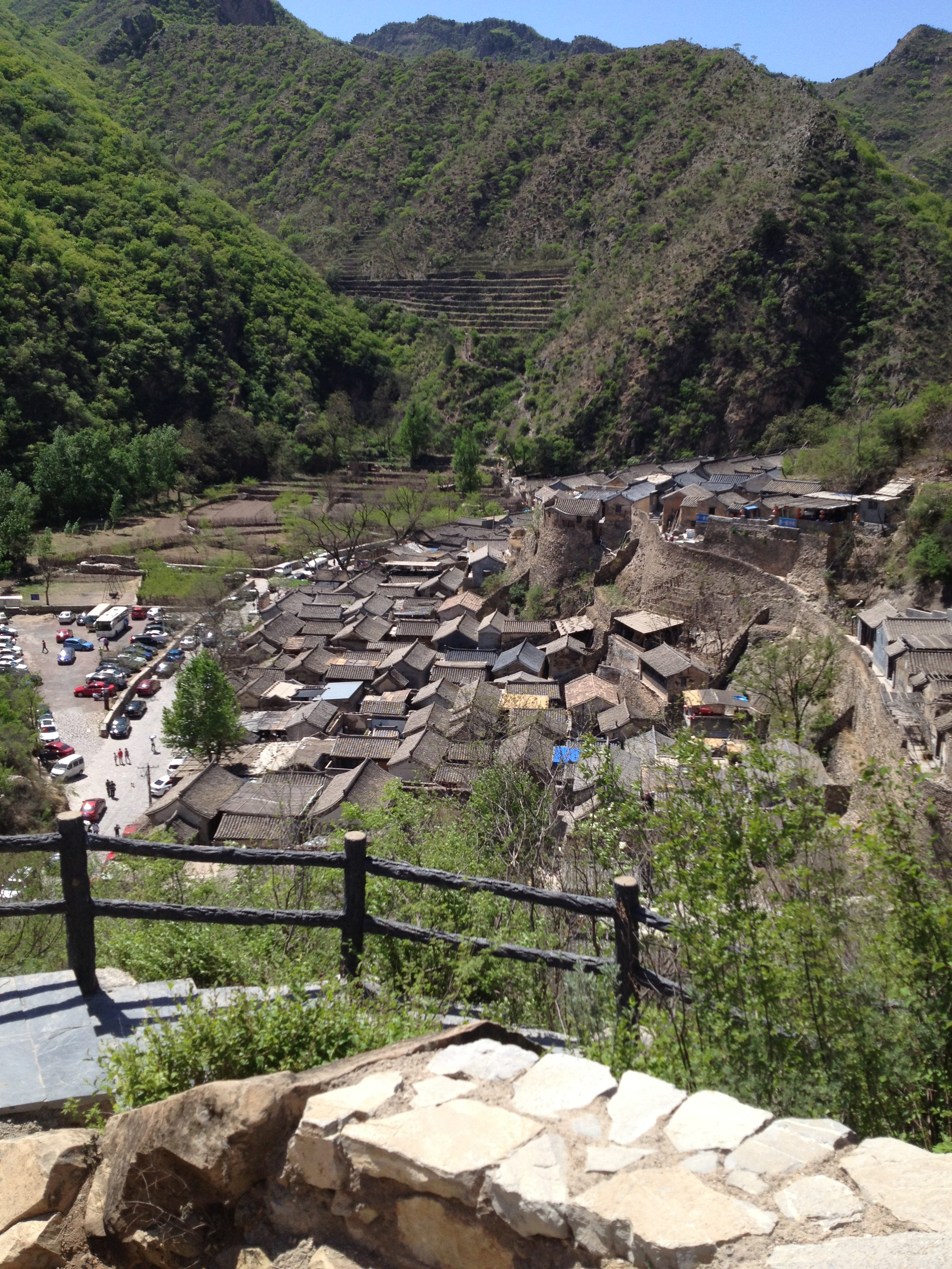 中文（中国大陆）: 北京西郊门头沟区斋堂镇